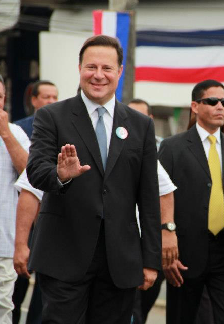 Juan Carlos Varela. Vicepresidente de Panamá (2009-2014), presidente electo de Panamá.